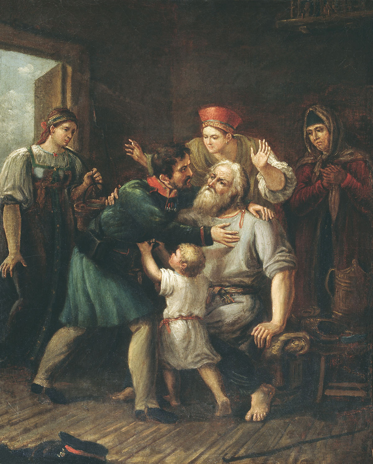 Вяртанне ратніка